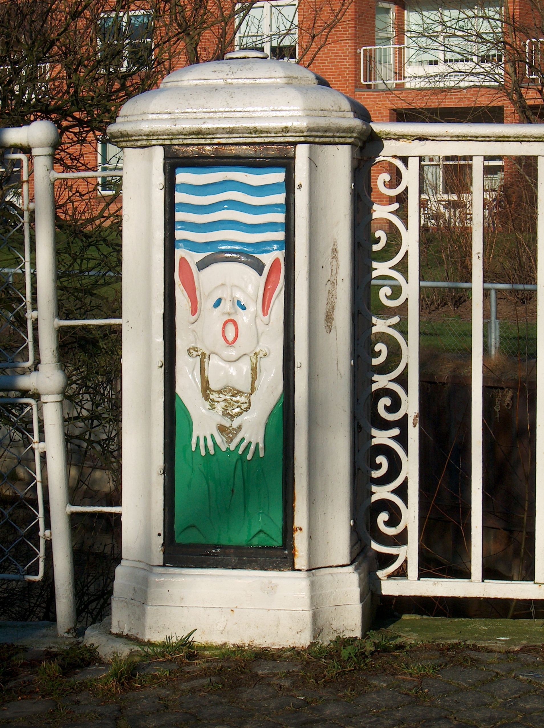 en Gryller i Århus ved Århus Å hvor Vestergade går over åen. "Smedens Bro for Vestergade" opført 1910-11